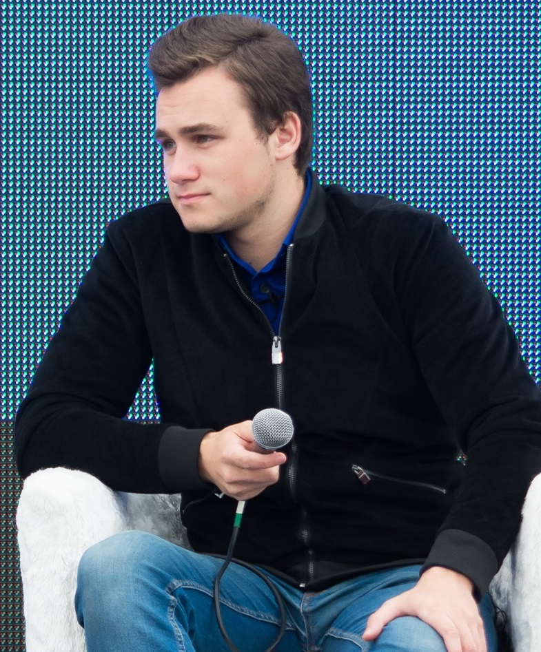 Николай Соболев на фестивале «Видфест» 2016 в Санкт-Петербурге